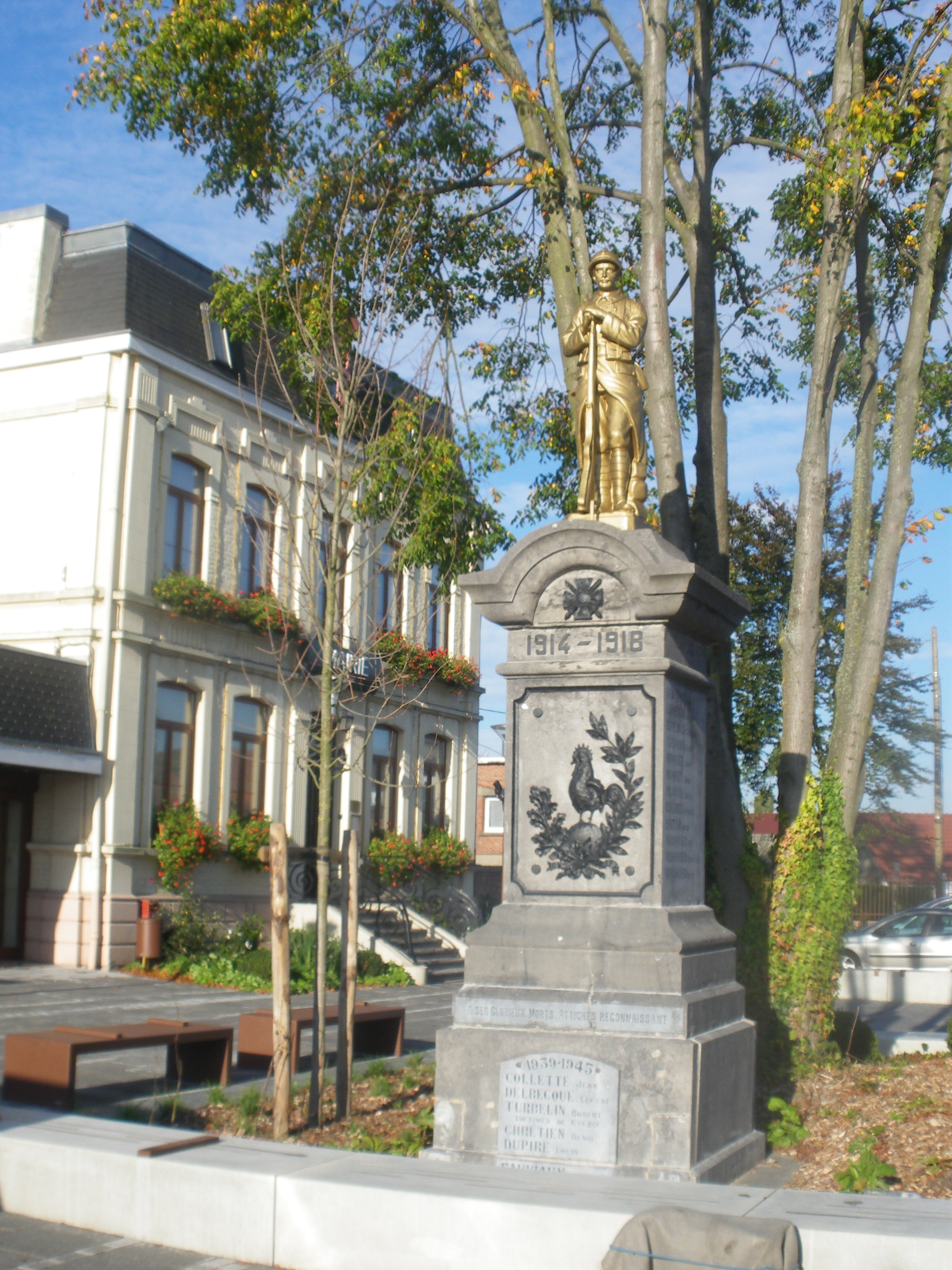 Vue de la mairie et du monument aux morts d'Attiches.